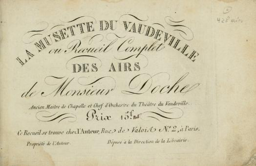 Page de titre de La musette du vaudeville recueil de 428 airs de Joseph-Denis Doche ancien chef d'orchestre au Théâtre du Vaudeville.